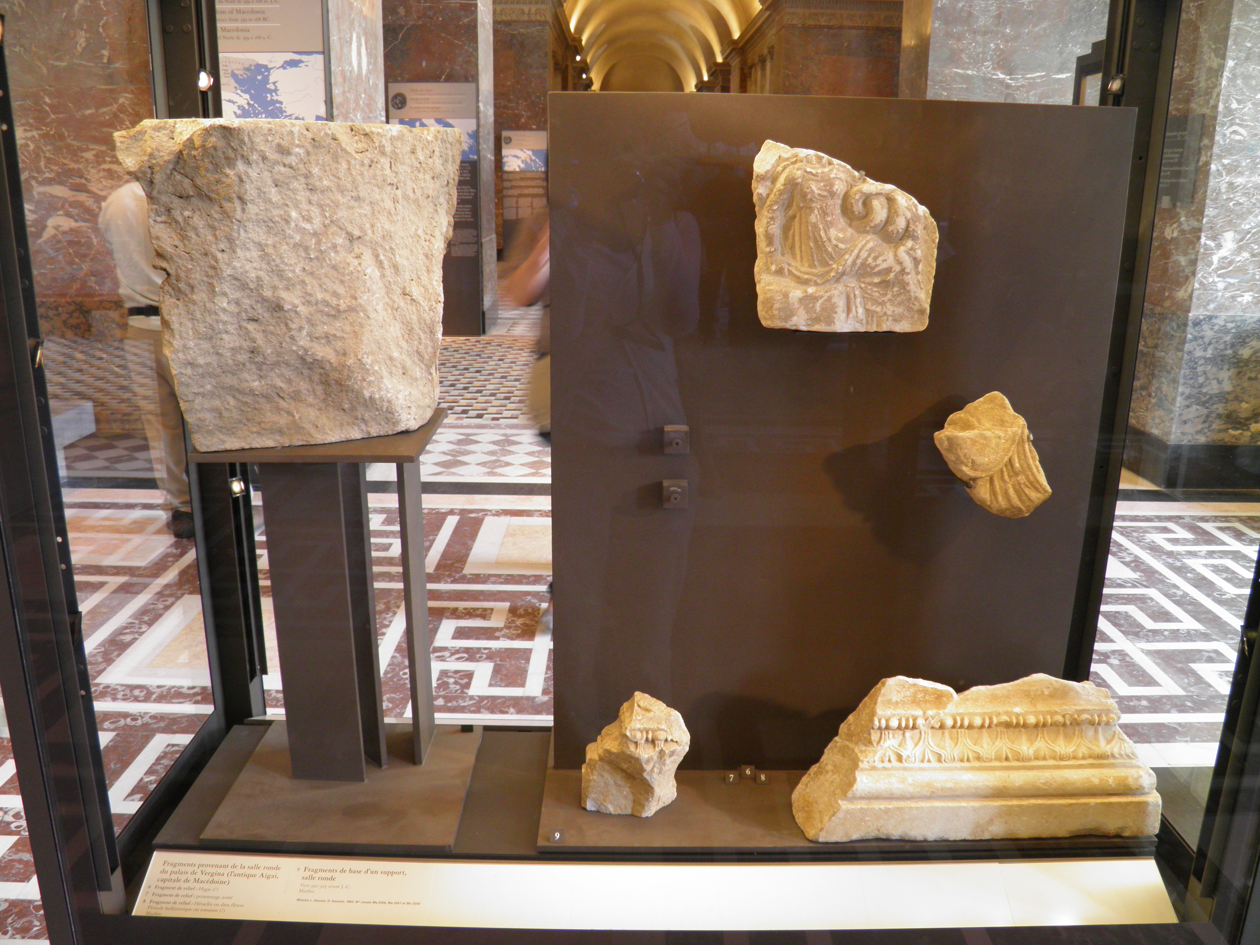 Fragments provenant de la salle ronde du palais de Vergina (l’antique Aigai, capitale de Macédoine). Période hellénistique ou romaine (?) Marbre. H.: 21 cm ; Lo.: 5,5 cm (Ma 2550) H.: 13,5 cm ; La.: 10,5 cm ; Ep.: 5 cm (Ma 2552) H.: 18,5 cm ; Lo.: 30 cm ; Ep.: 9 cm (Ma 2549) Mission L. Heuzey, H. Daumet, 1863. Ma 2550 , Ma 2552 et Ma 2549